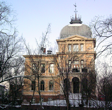 «Uranienborgslottet», Uranienborg terrasse 2, Oslo. Built 1886. Architects: Paul Due and Bernhard Steckmest. Neo-Renaissance.